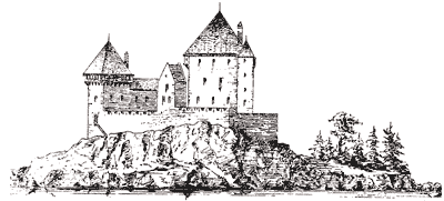 Valdisholm Borg sett østfra.